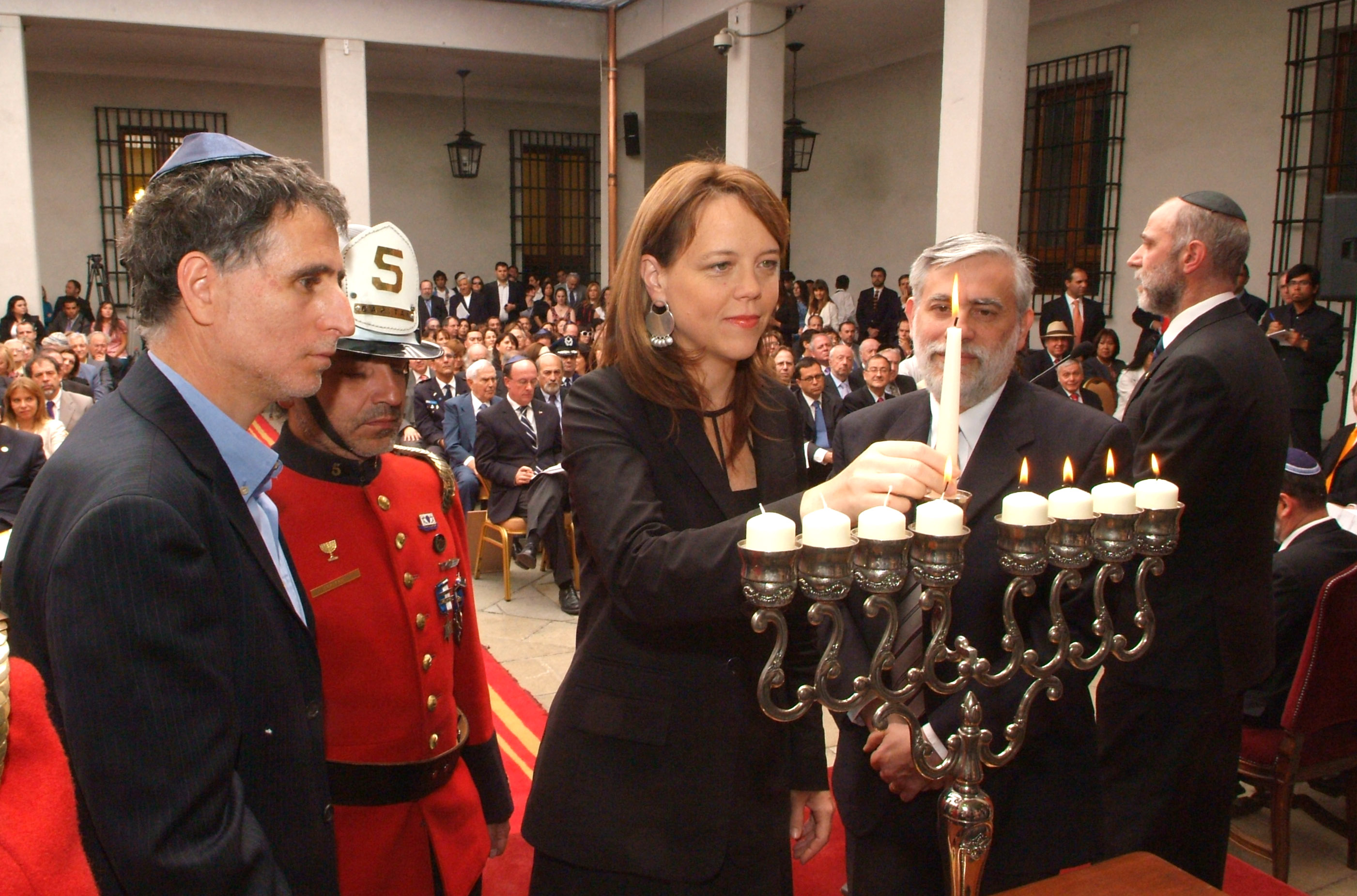 Ministra Secretaria General de Gobierno,Ena von Baer,participa en la Celebración Festividad Judía Januca.Palacio de la Moneda.